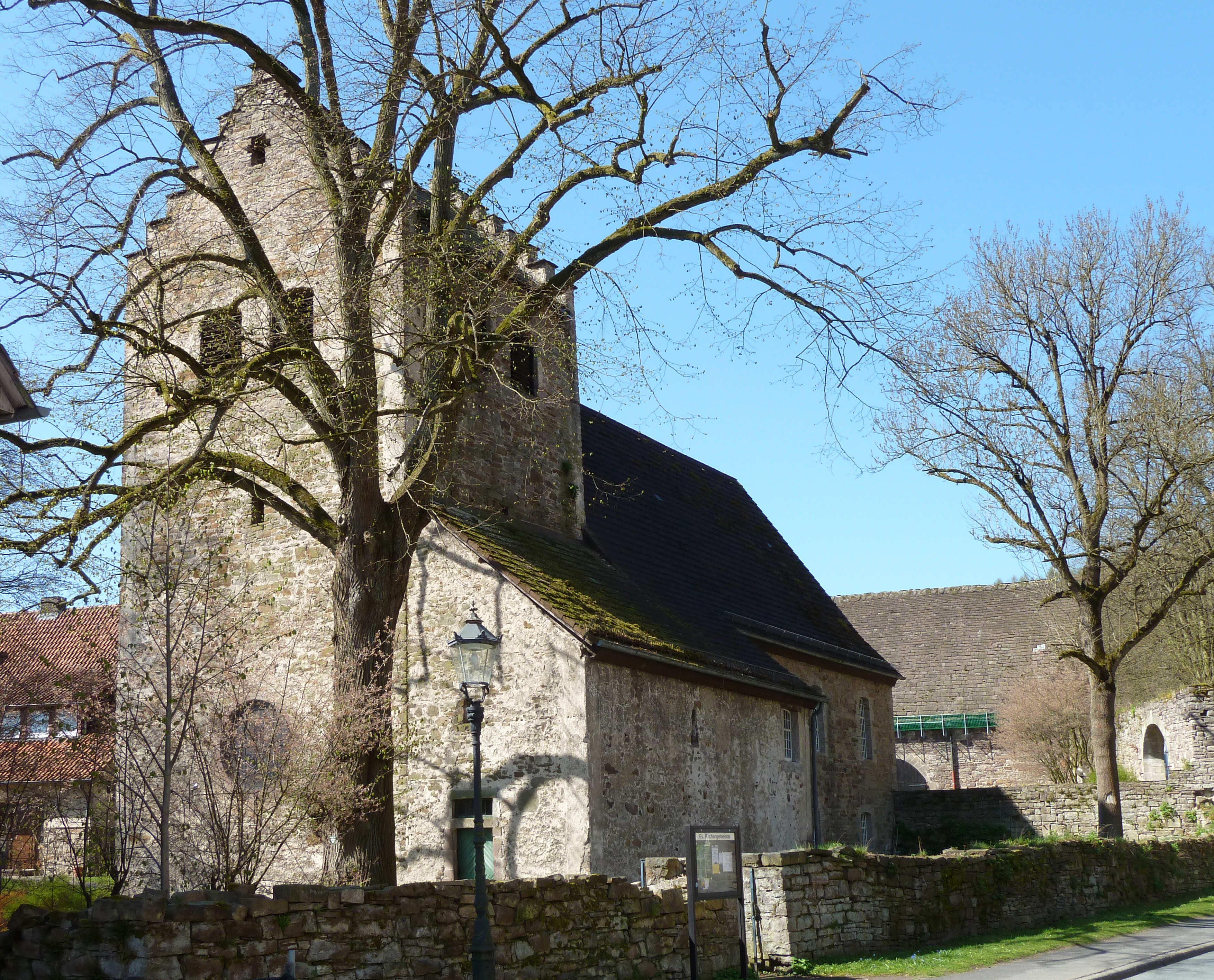 Ev. Stadtkirche in Helmarshausen, Stadt Bad Karlshafen, Hessen. Im Kern romanisch, Umbauten 1467 und 1799